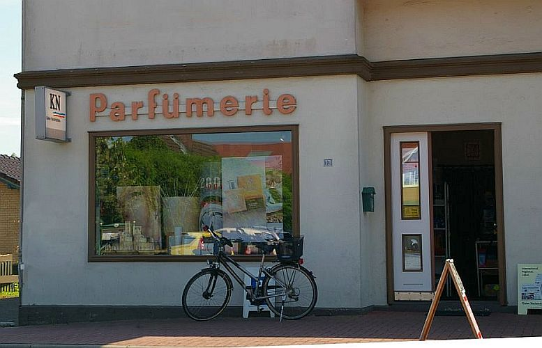 Parfümerie